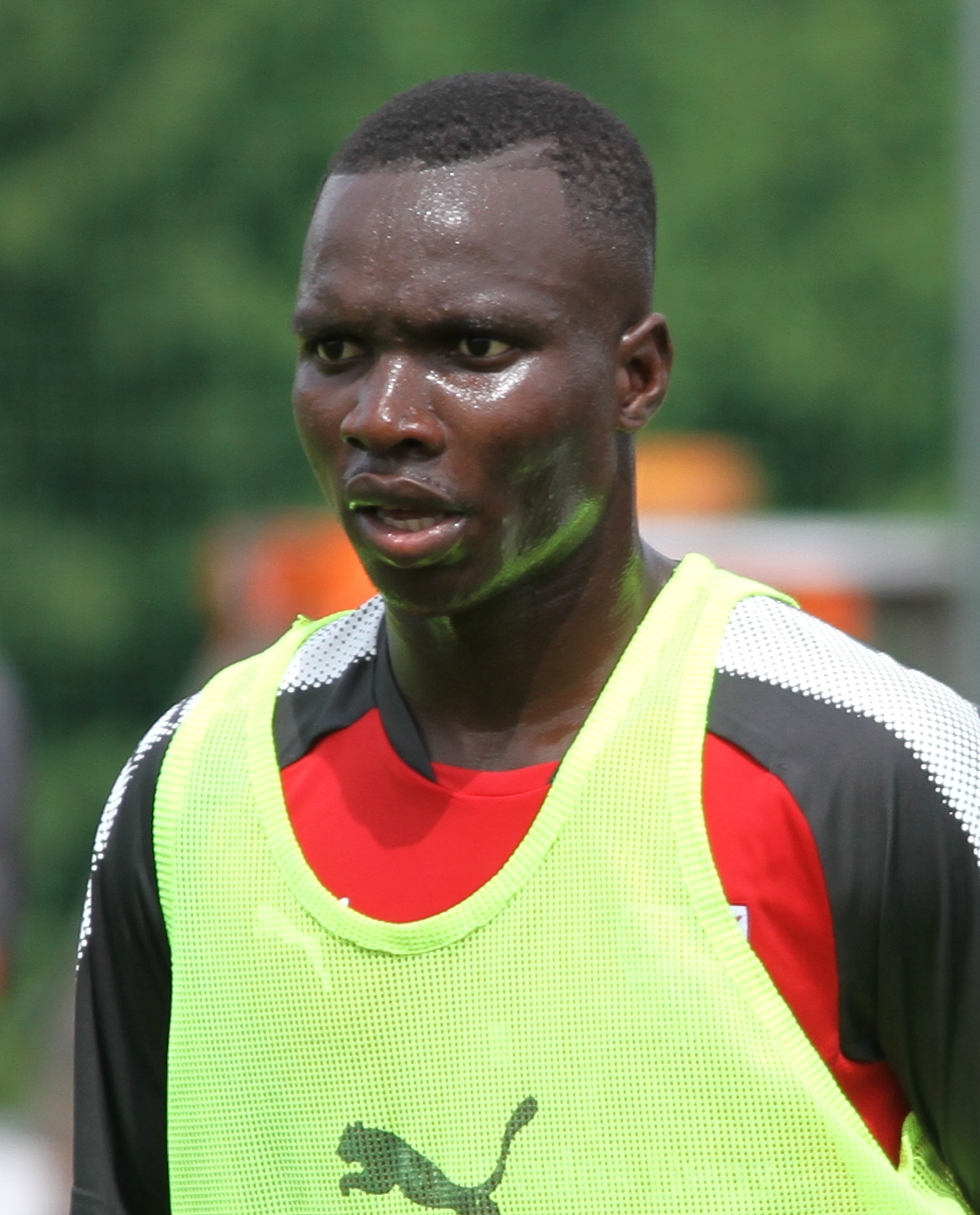 Chadrac Akolo im Trainingslager in Grassau. Aufgenommen von